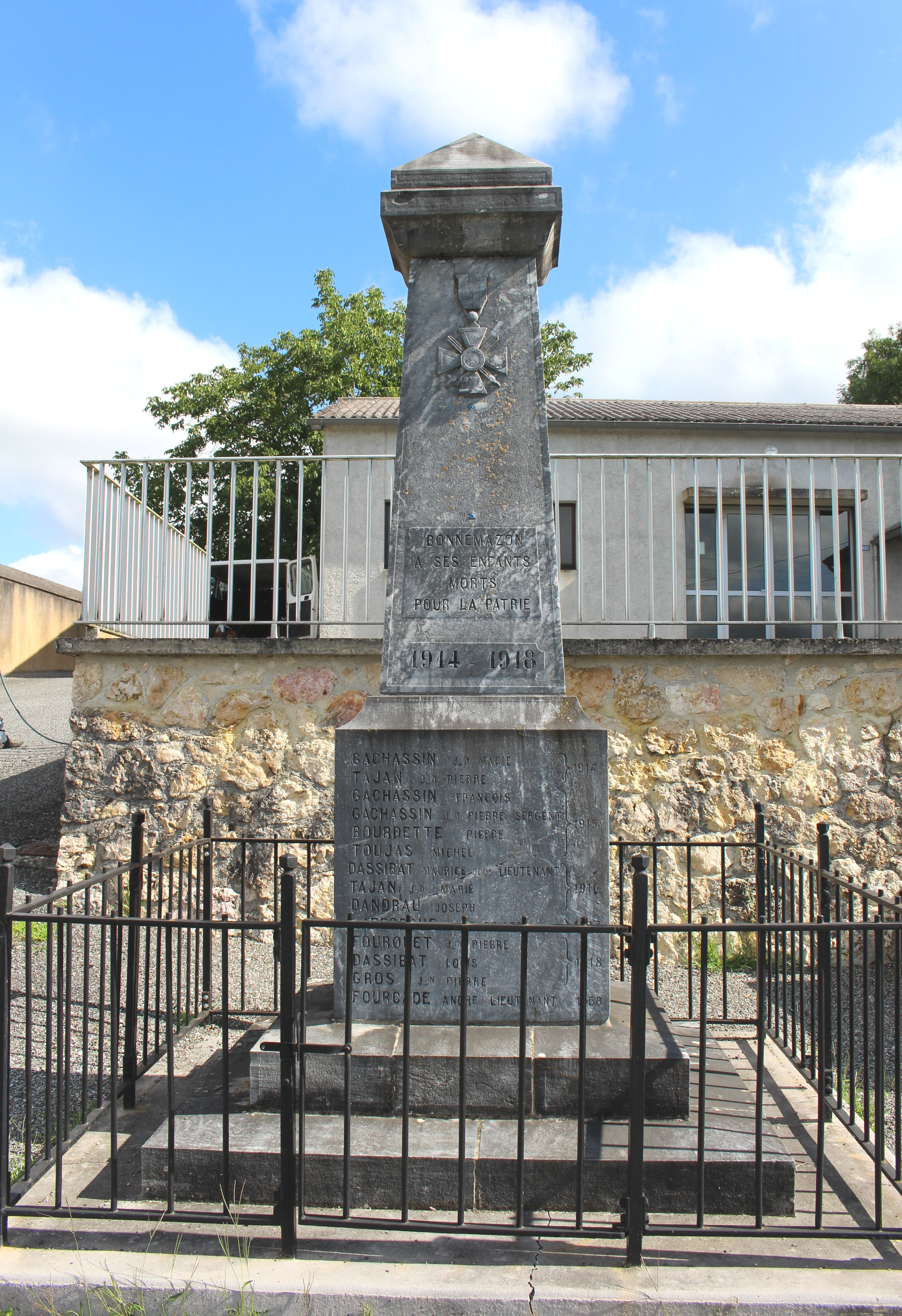 Monument aux morts de Bonnemazon (Hautes-Pyrénées)